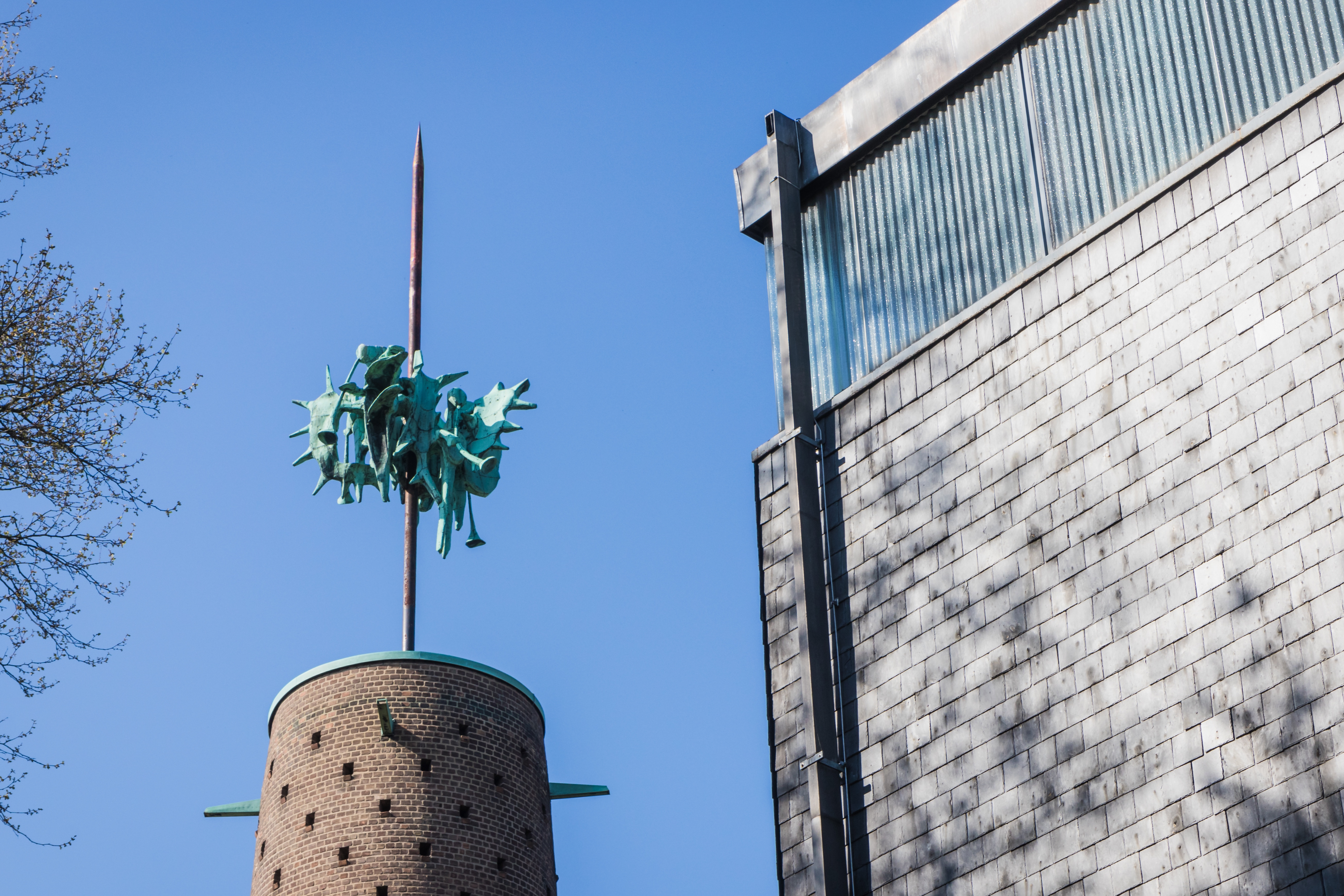 St. Pius X. in Flittard, Entwurf Margot und Joachim Schürmann